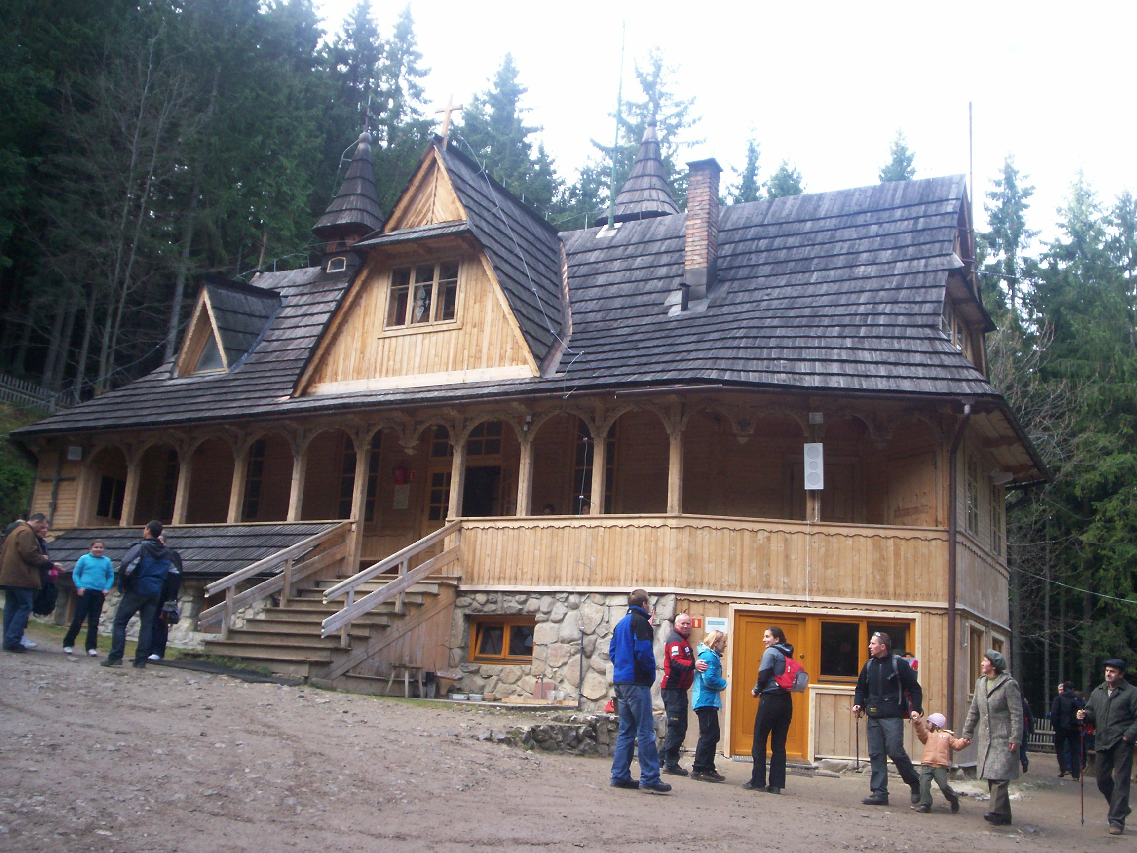 Zakopane, kaplica Matki Boskiej Jaworzyńskiej Królowej Tatr na Wiktorówkach.